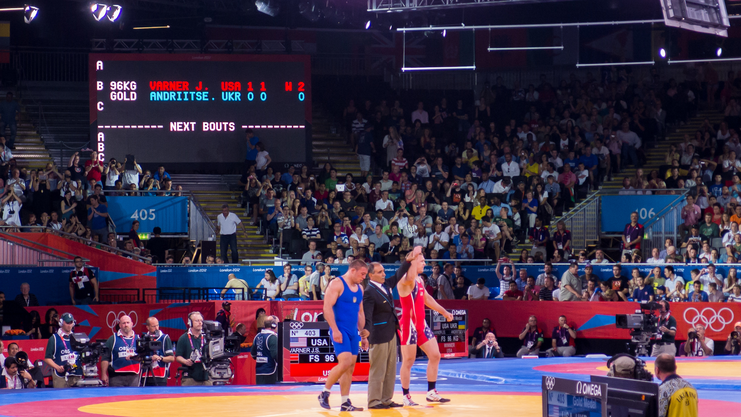 USA v Ukraine